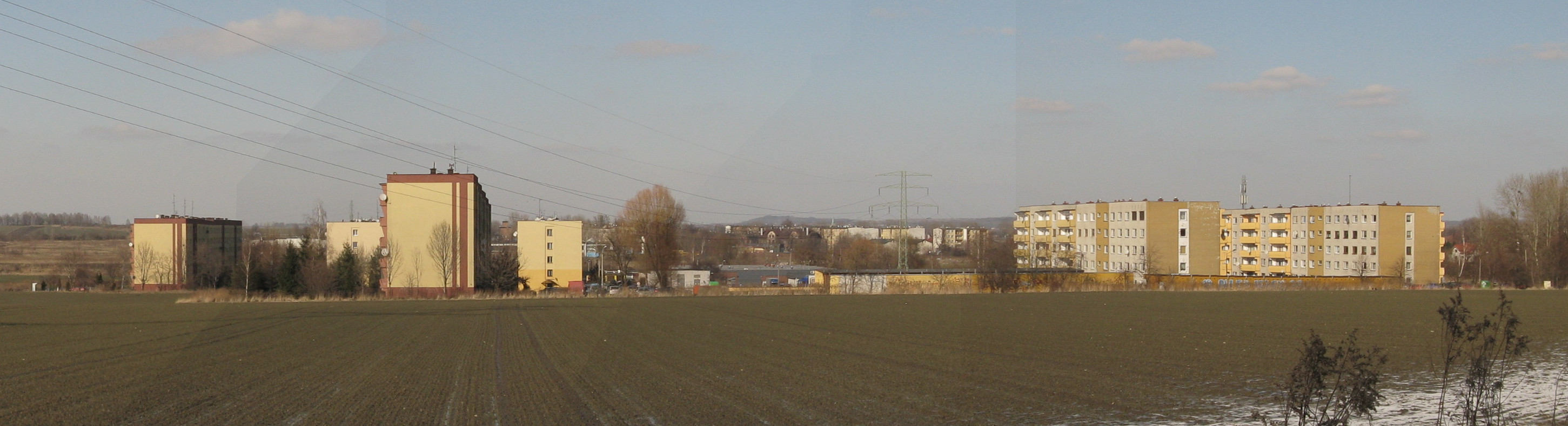 Sídliště Budryka na hranici polských měst Siemianowice Śląskie a Chořov v Horním Slezsku.